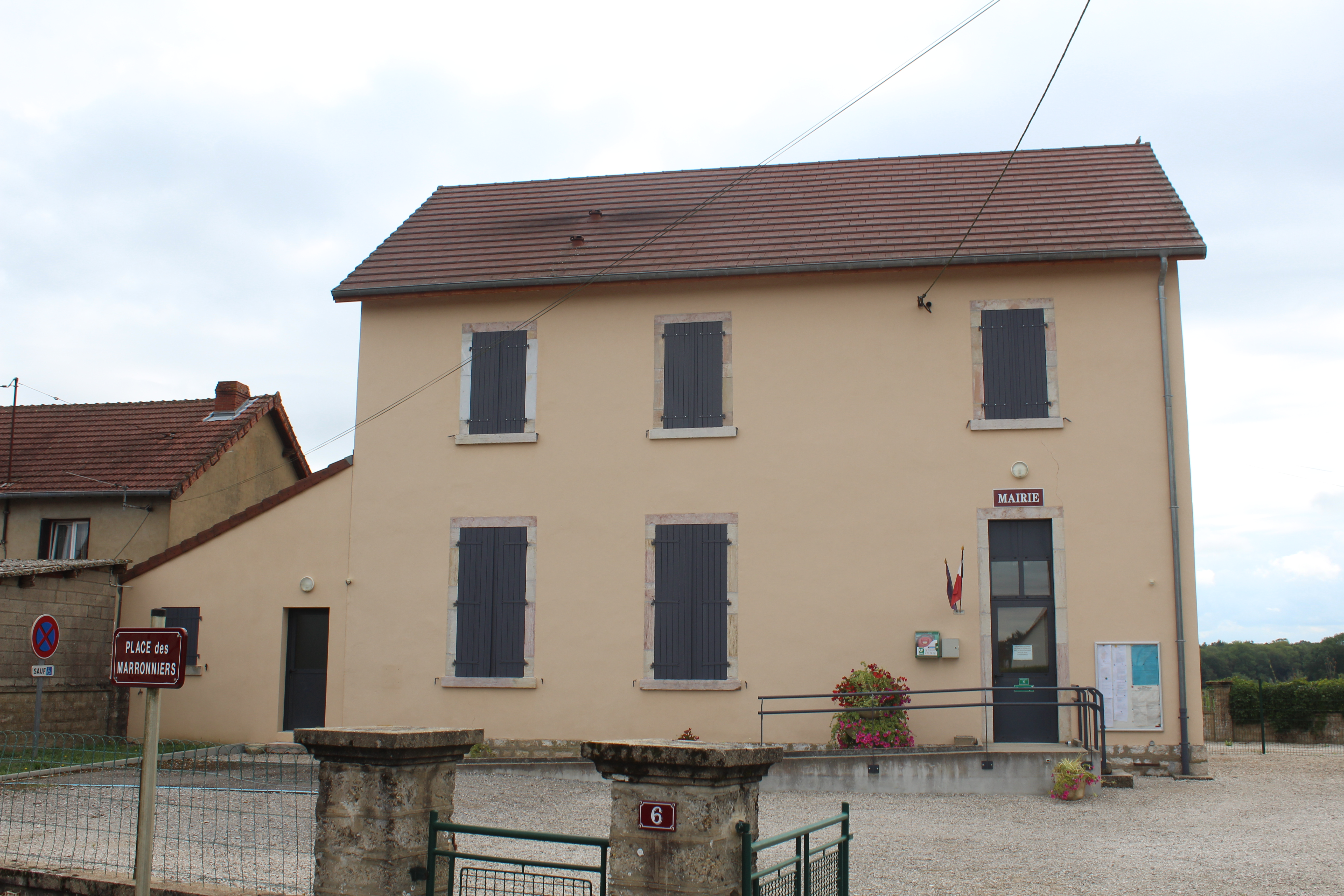 Mairie de Foulenay.